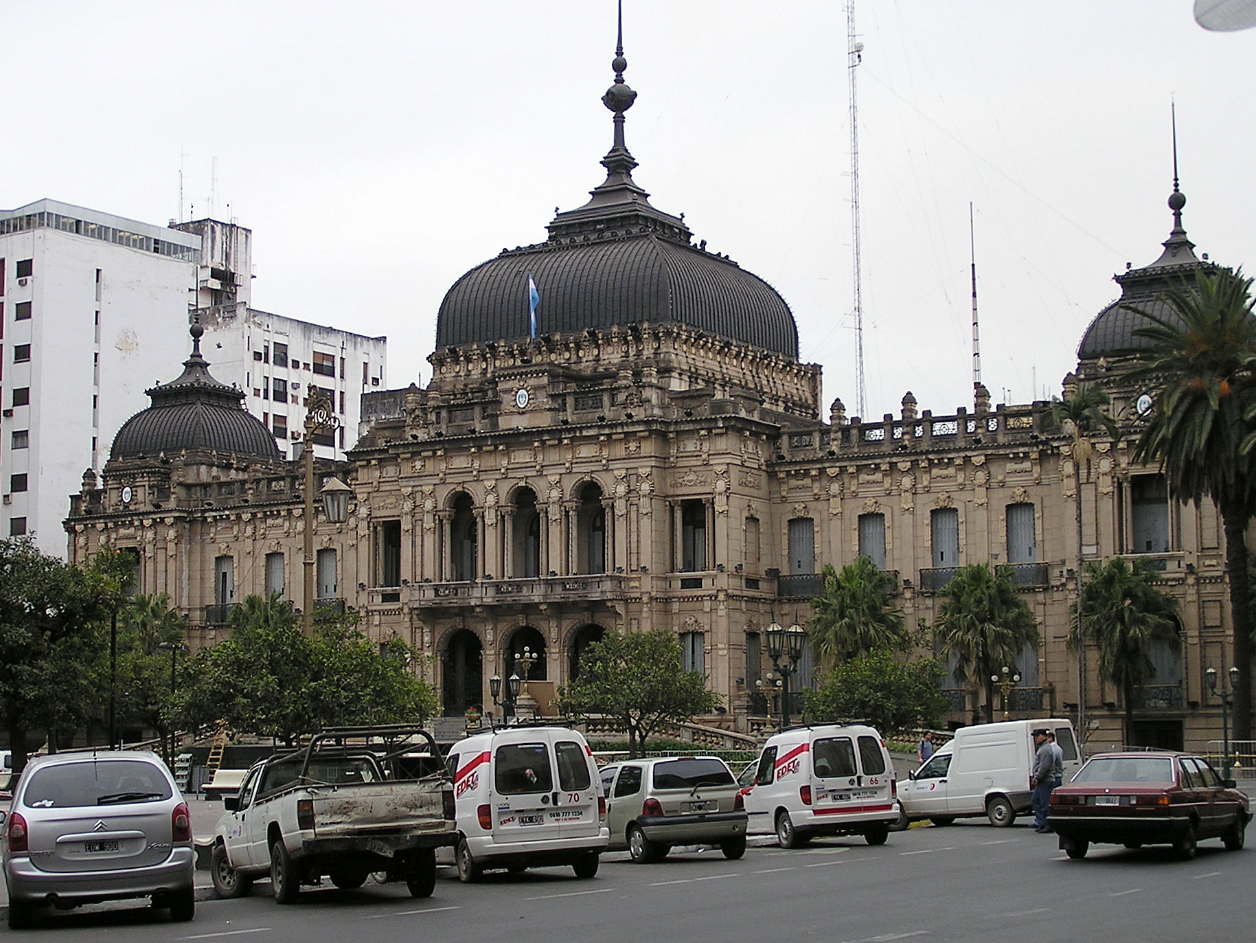 Frente de la Casa de Gobierno de Tucumán